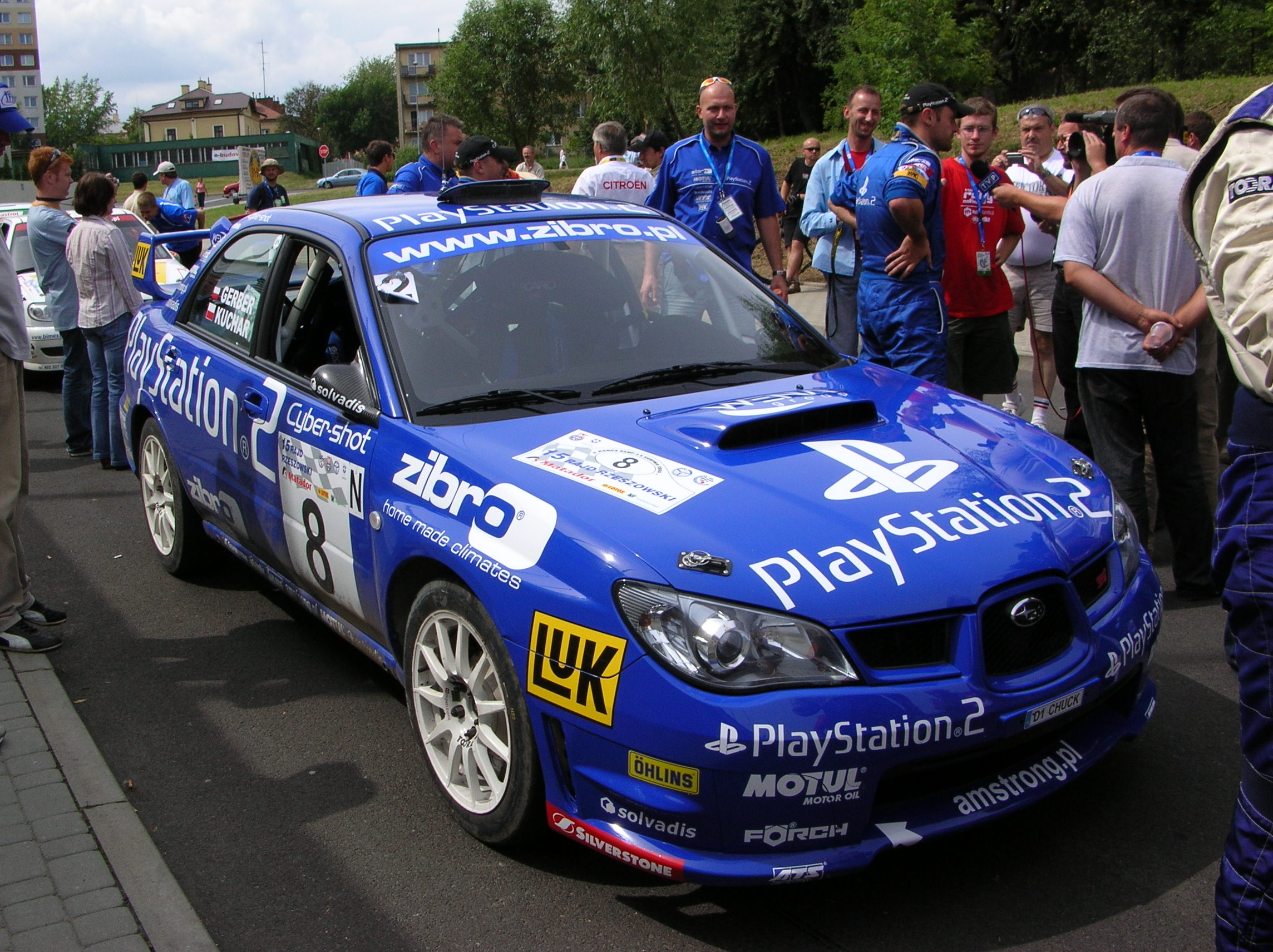 Subaru_Impreza_STI Tomasz_Kuchar 15. Rajd Rzeszowski